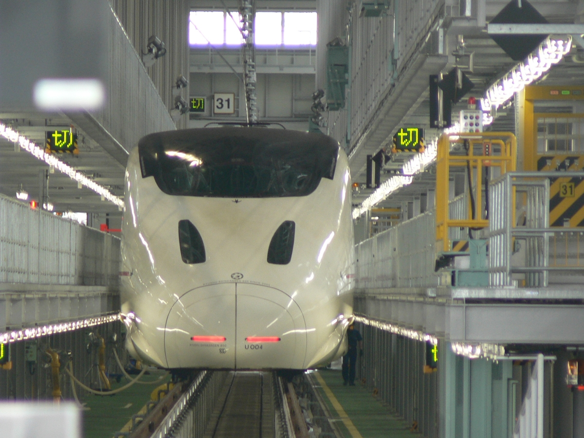 熊本総合車両所内の新幹線800系(U004編成)。敷地外から撮影。